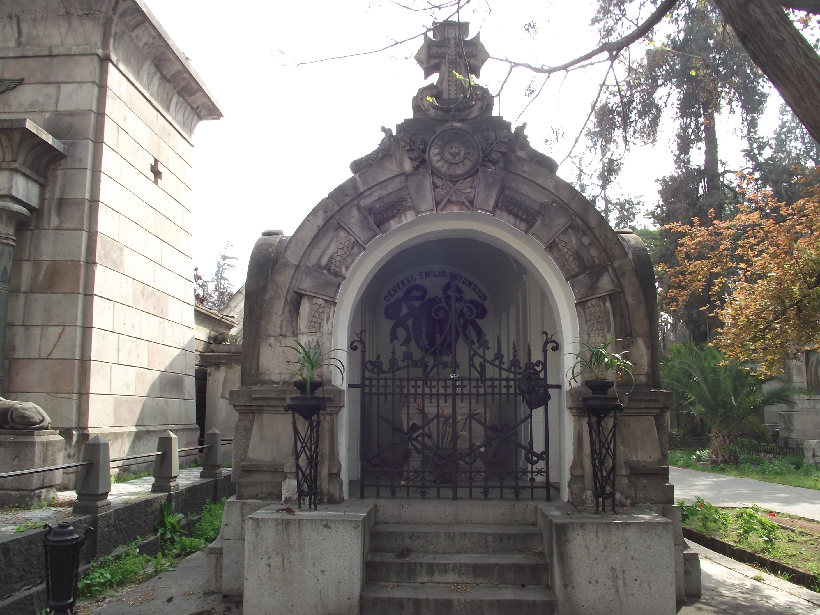 Tumba de Emilio Sotomayor, militar chileno que participó en la Guerra del Pacífico, en el Cementerio General de Santiago.